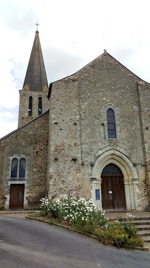 Église Notre-Dame de Séronne à Châteauneuf-sur-Sarthe (Maine-et-Loire, France).